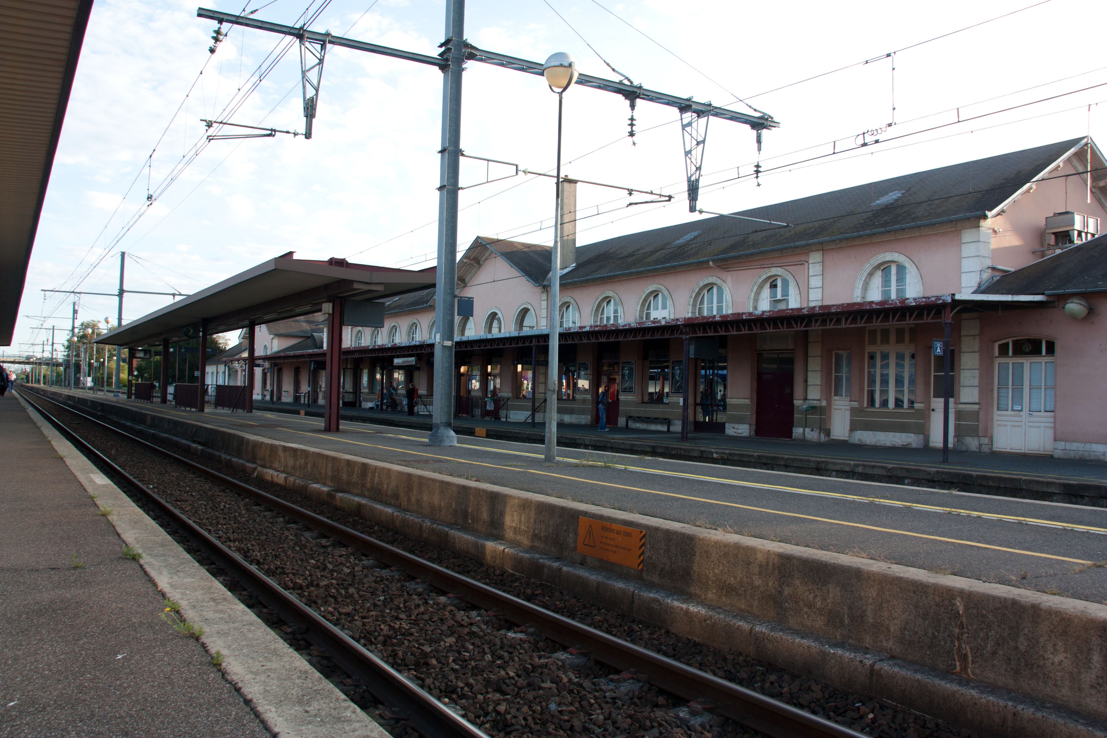 Gare de Montargis, Montargis, Loiret, France.